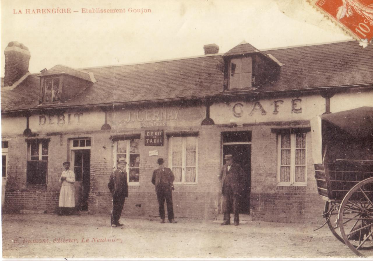 Ancien café (maintenant inexistant) de la Harengère